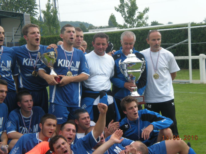 L'equipe exulte apres sa victoire en 2010.